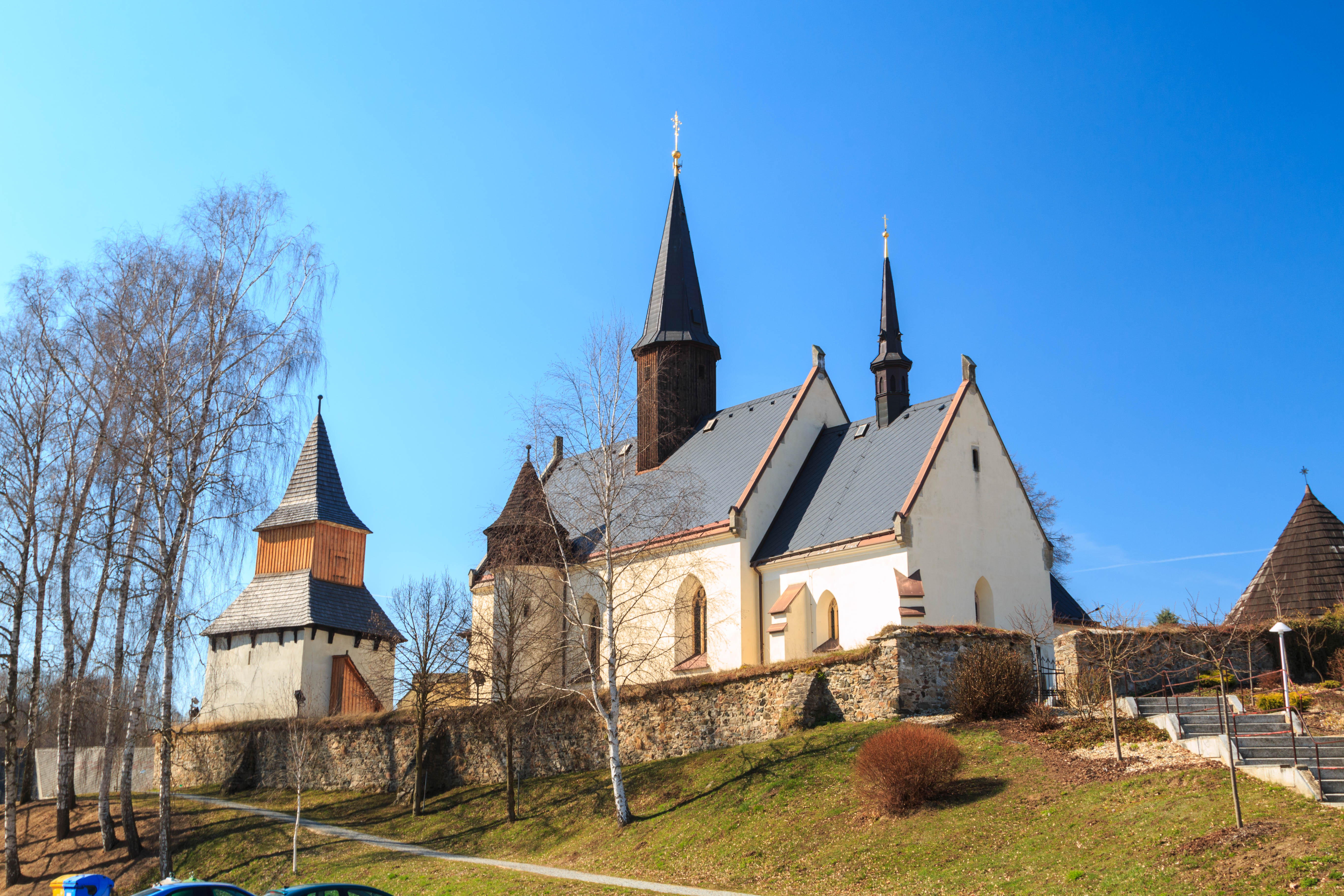 Kostel svatých Petra a Pavla, v obci, Korouhev (okres Svitavy).